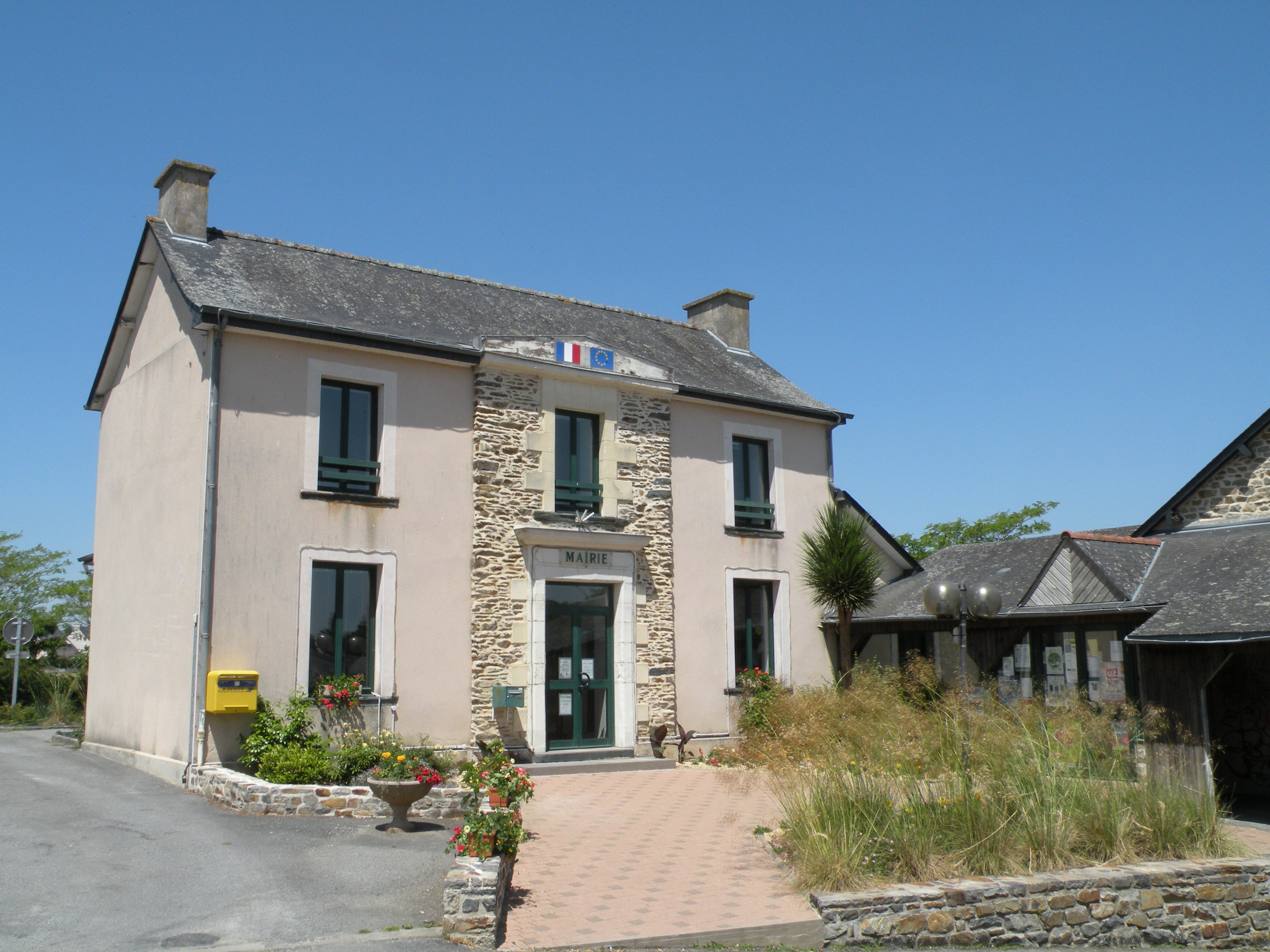 Mairie de Saint-Didier (Ille-et-Vilaine).